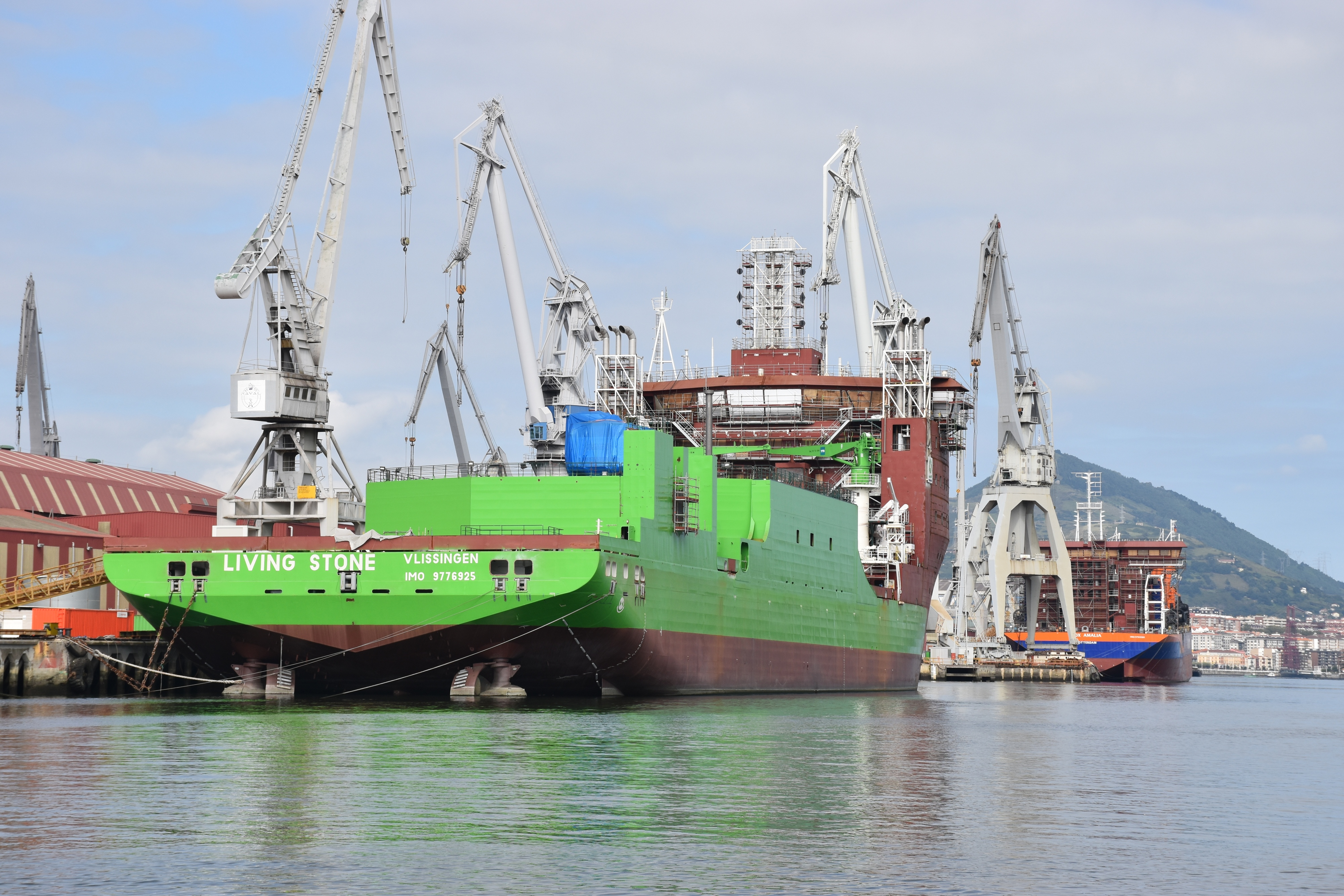 El Living Stone y Vox Amalia en construcción en LaNaval de Sestao, 13 de Agosto 2017.